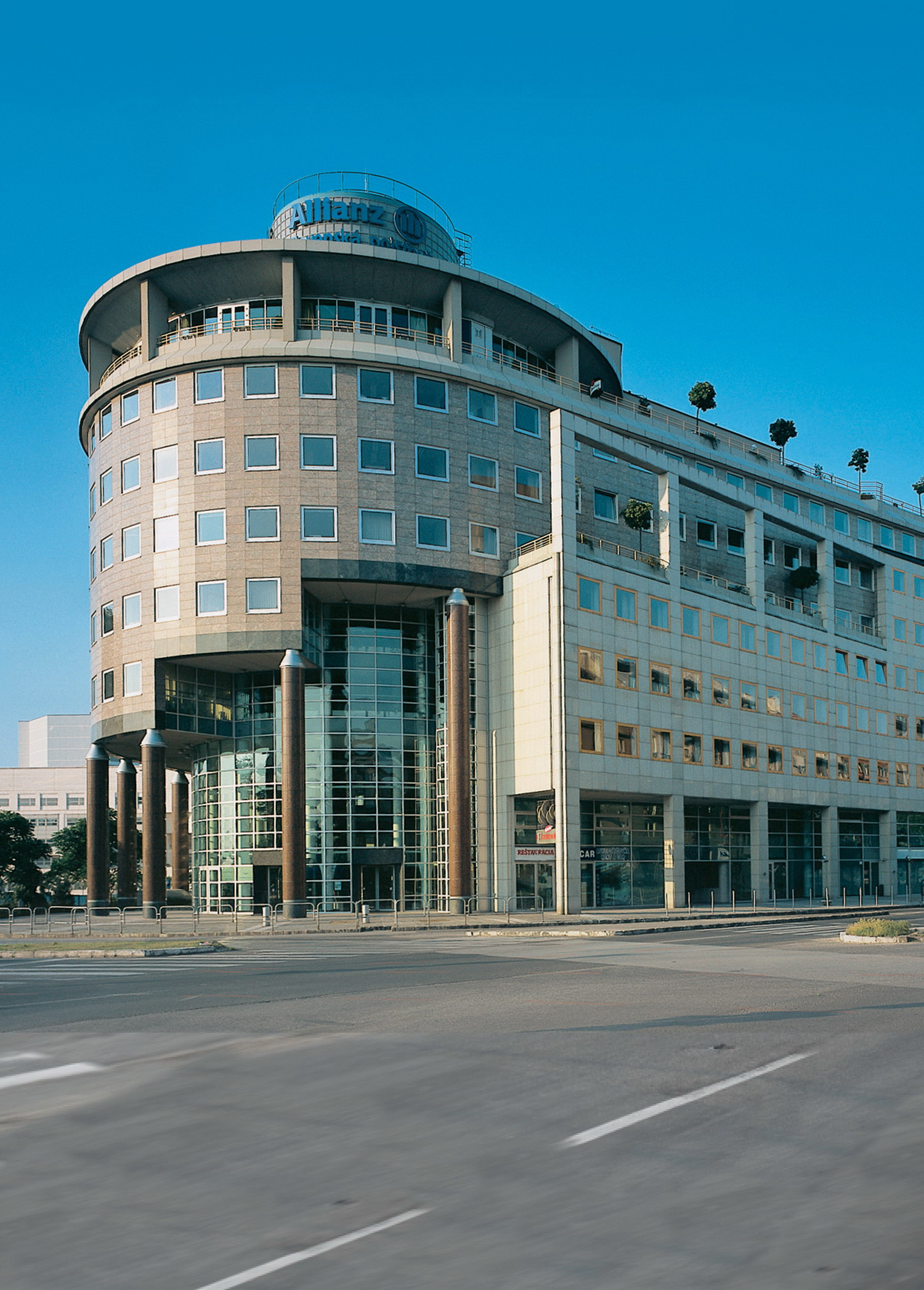 Fotografia budovy ASP v Bratislave